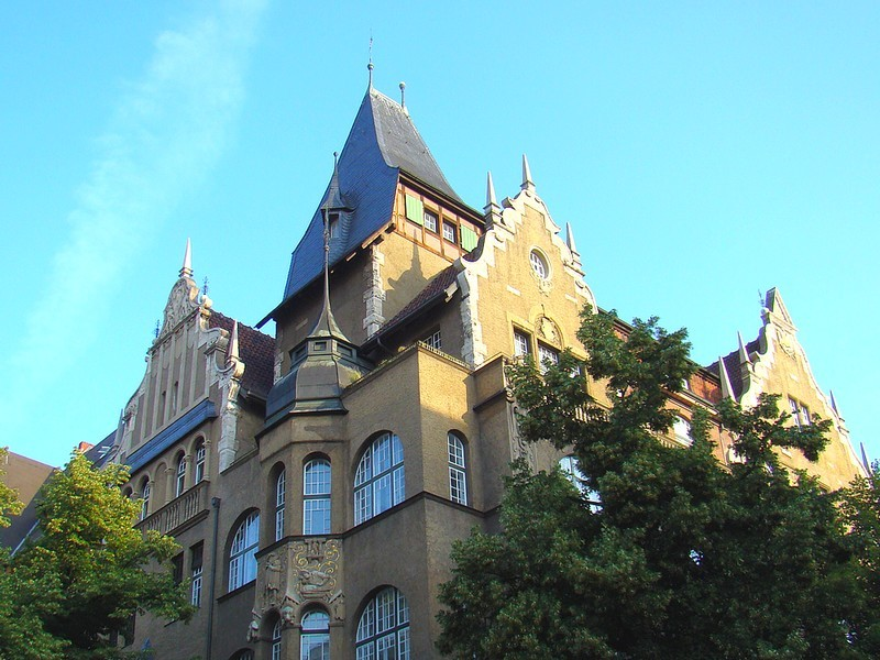 Häuserfront in der Bleibtreustraße Berlin Charlottenburg Fotoserie